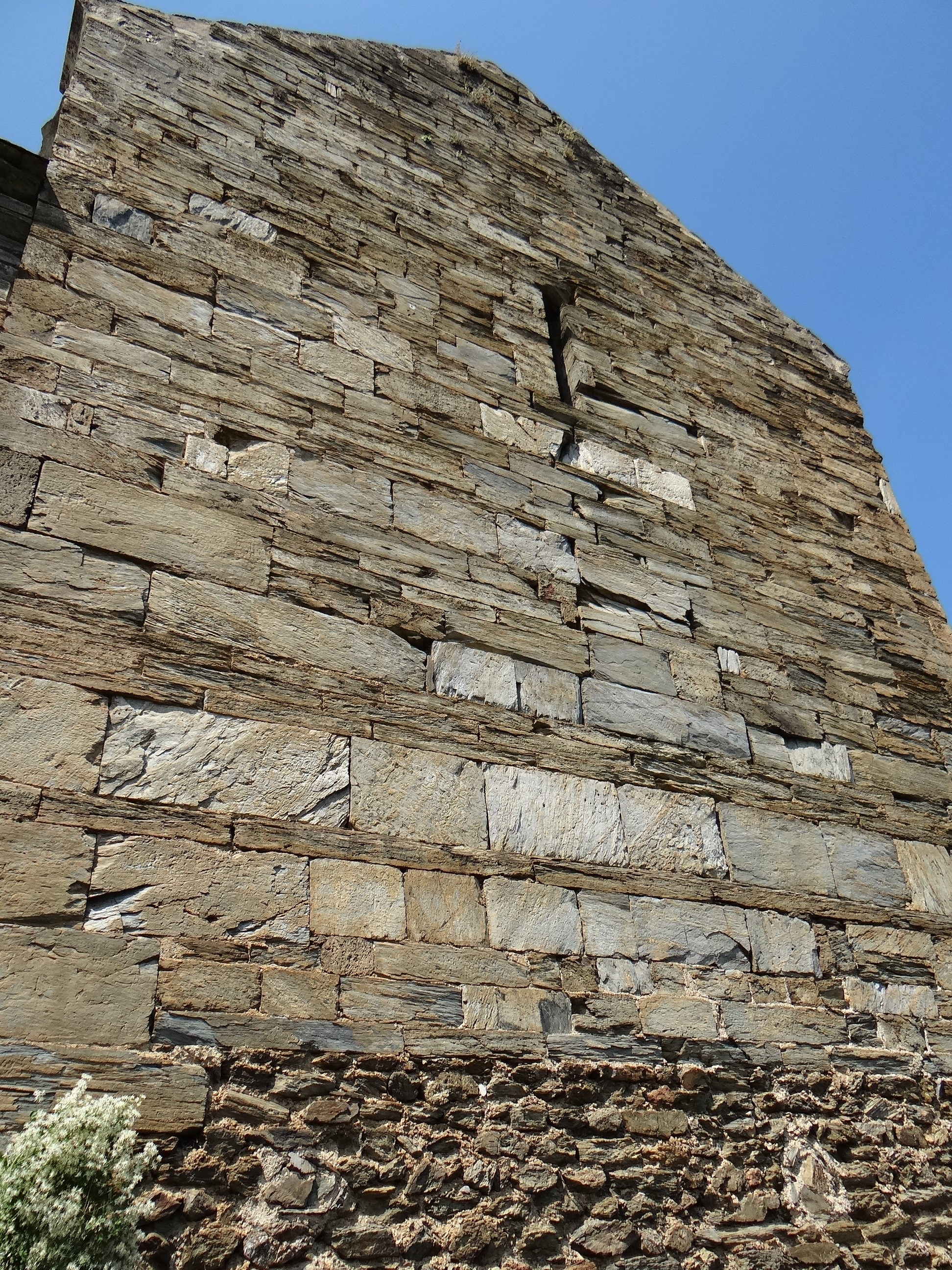 Prieuré de Serrabone - Mur du transept - Appareillage